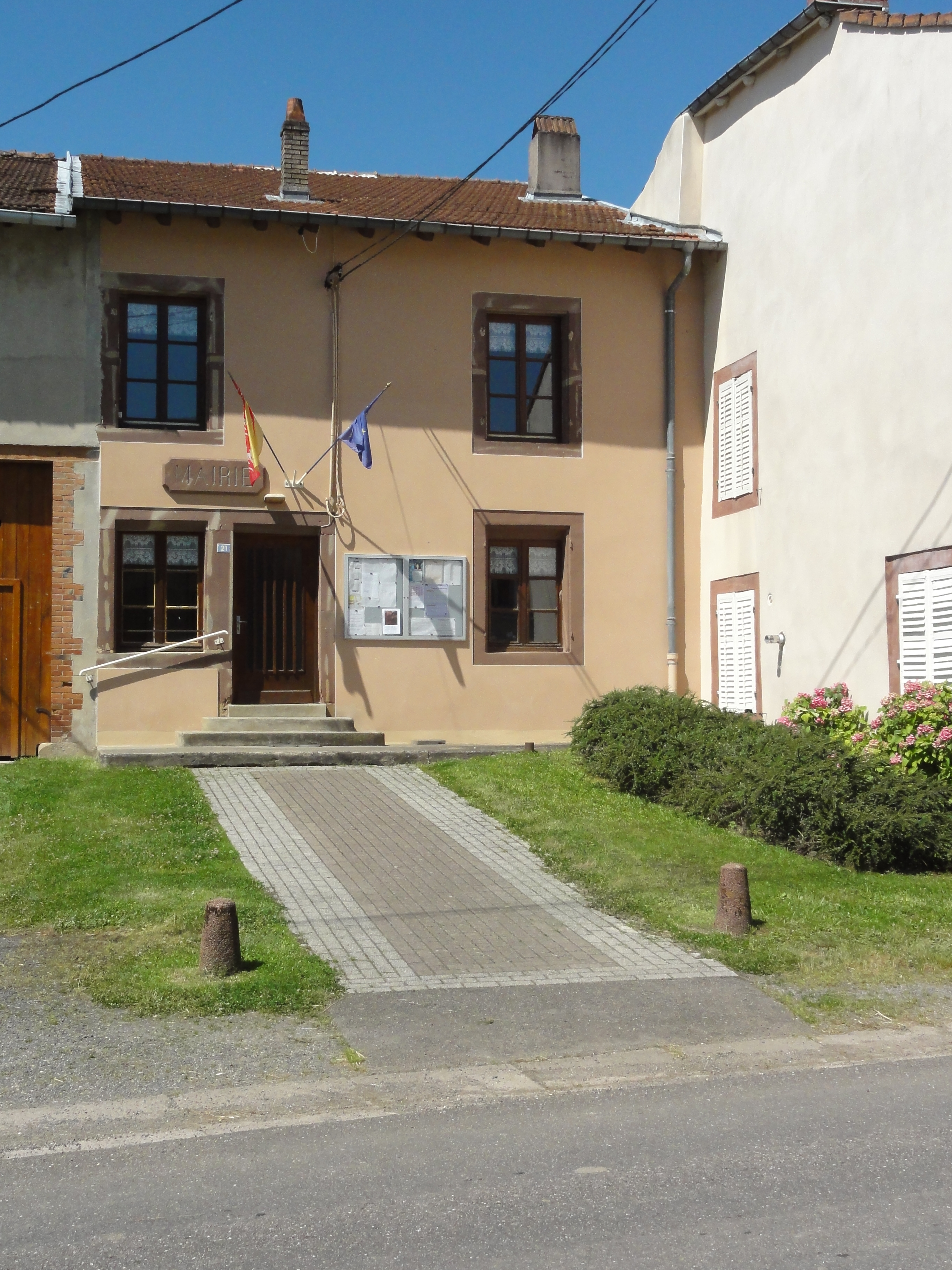 Réclonville (M-et-M) mairie